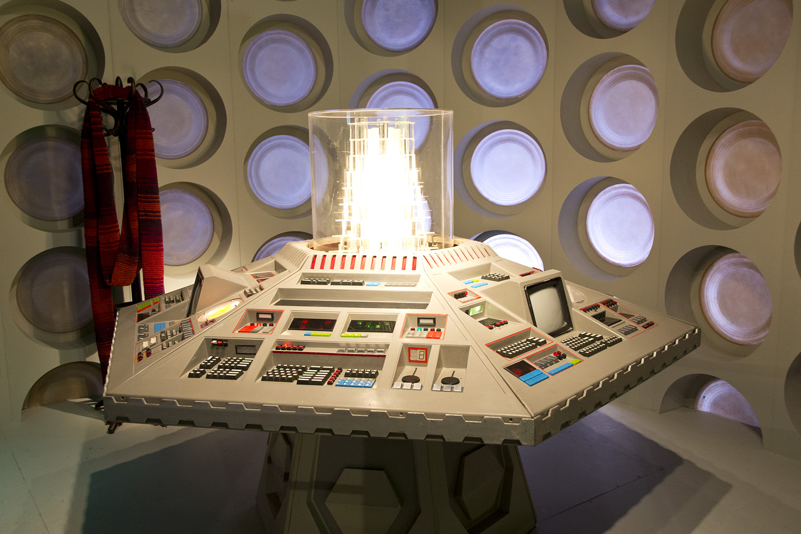 Best Tardis!